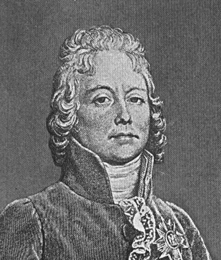 Charles Maurice de Talleyrand-Périgord (1754-1838)